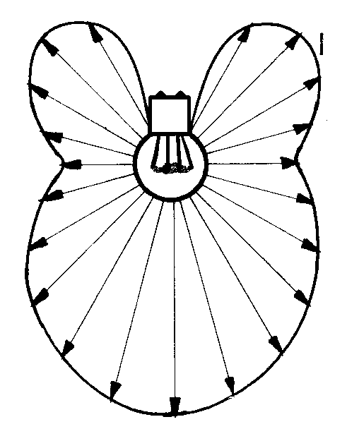 Retire l'indicatrice de luminance de "Indicatrices d'une lampe.png". L'indicatrice concerne l'intensité, exclusivement.